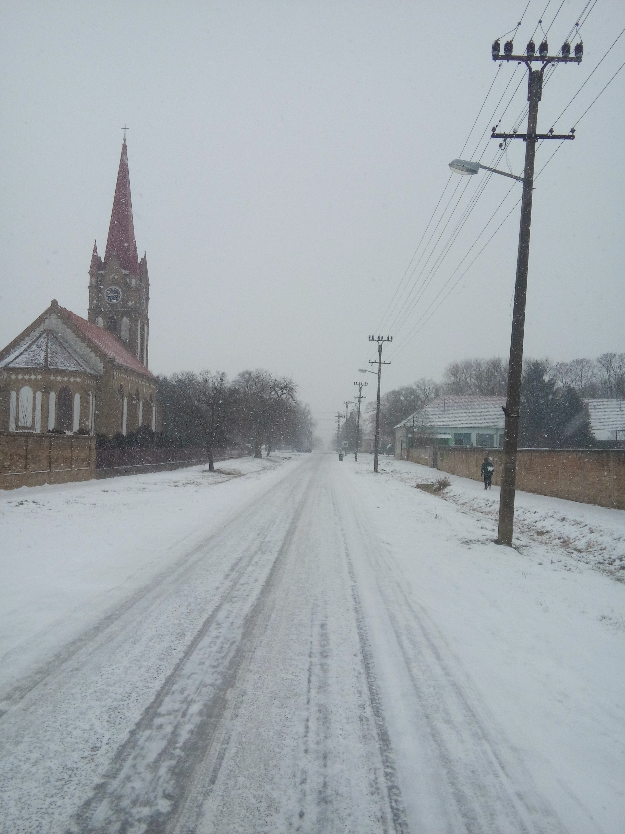 Католичка црква у Будисави